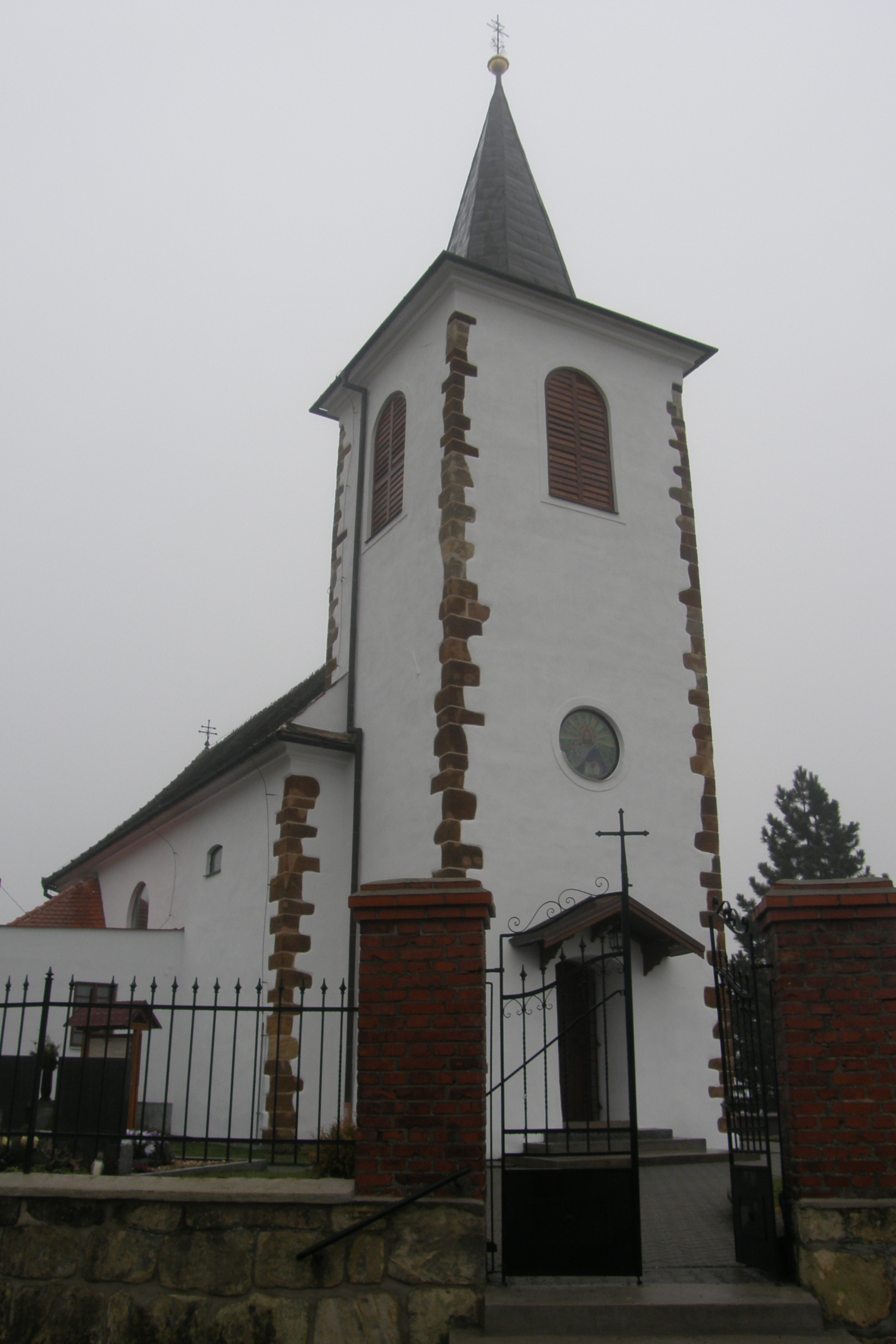 Kostel svatého Michaela archanděla ve Vískách